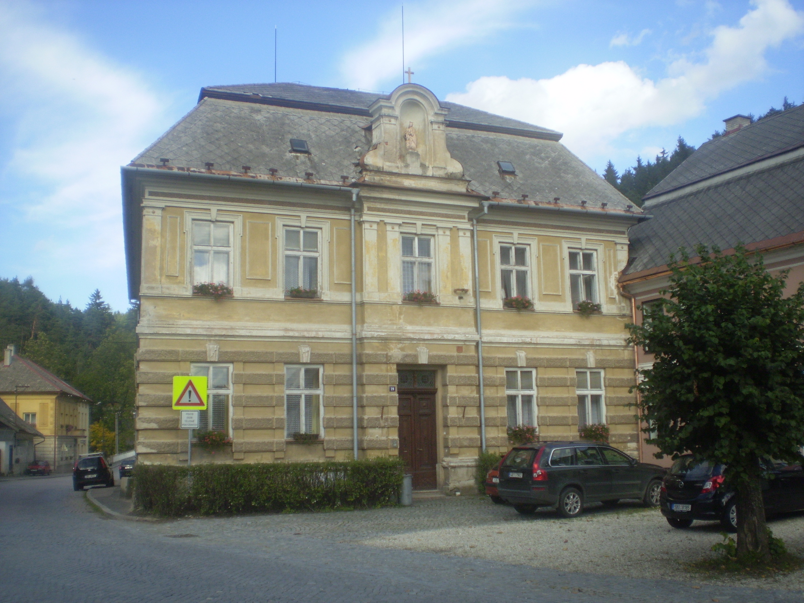 Bývalý klášter Christianeum